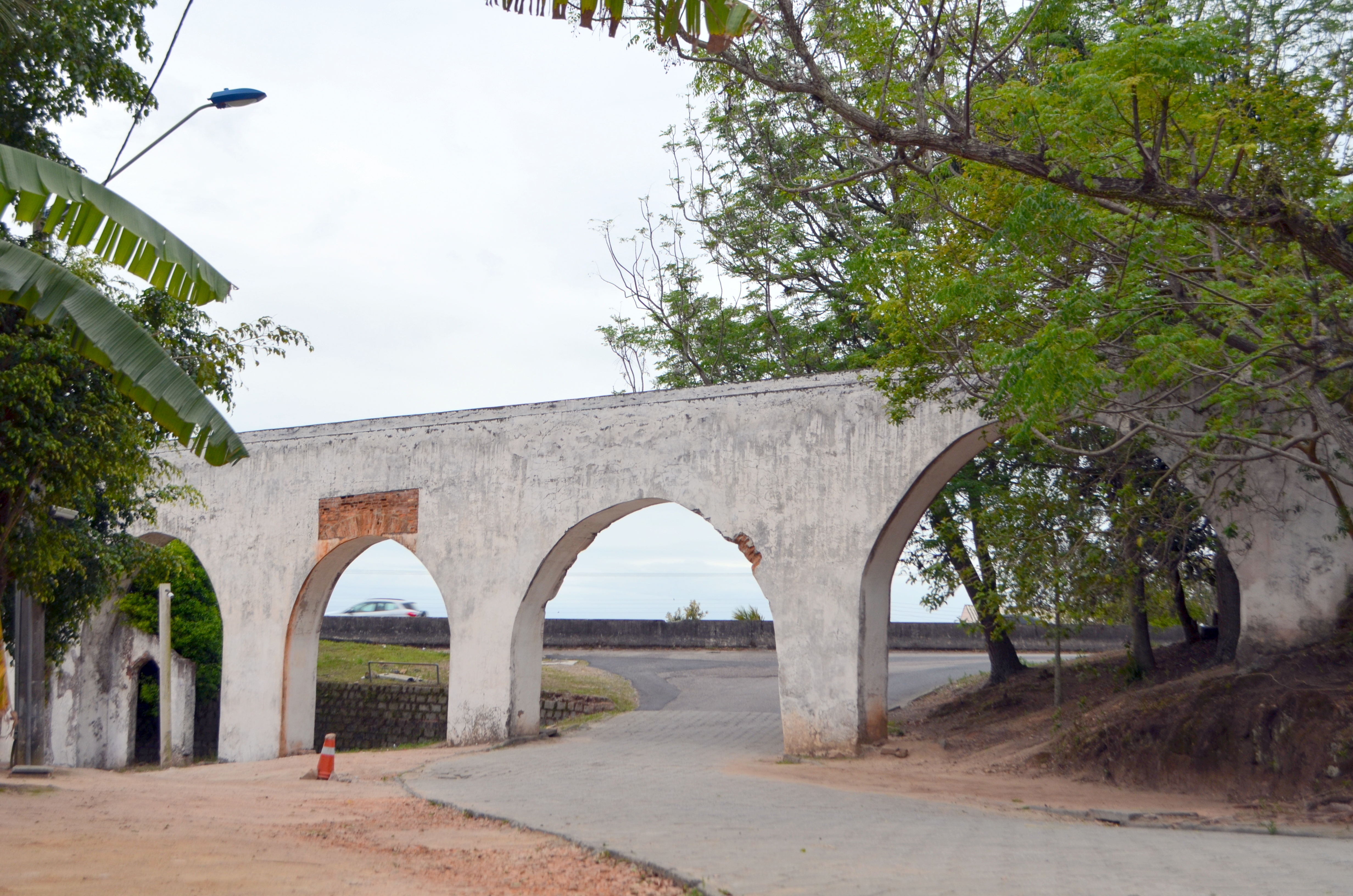 Vila de São Miguel: conjunto arquitetônico e paisagístico: Igreja, Aqueduto, Carioca